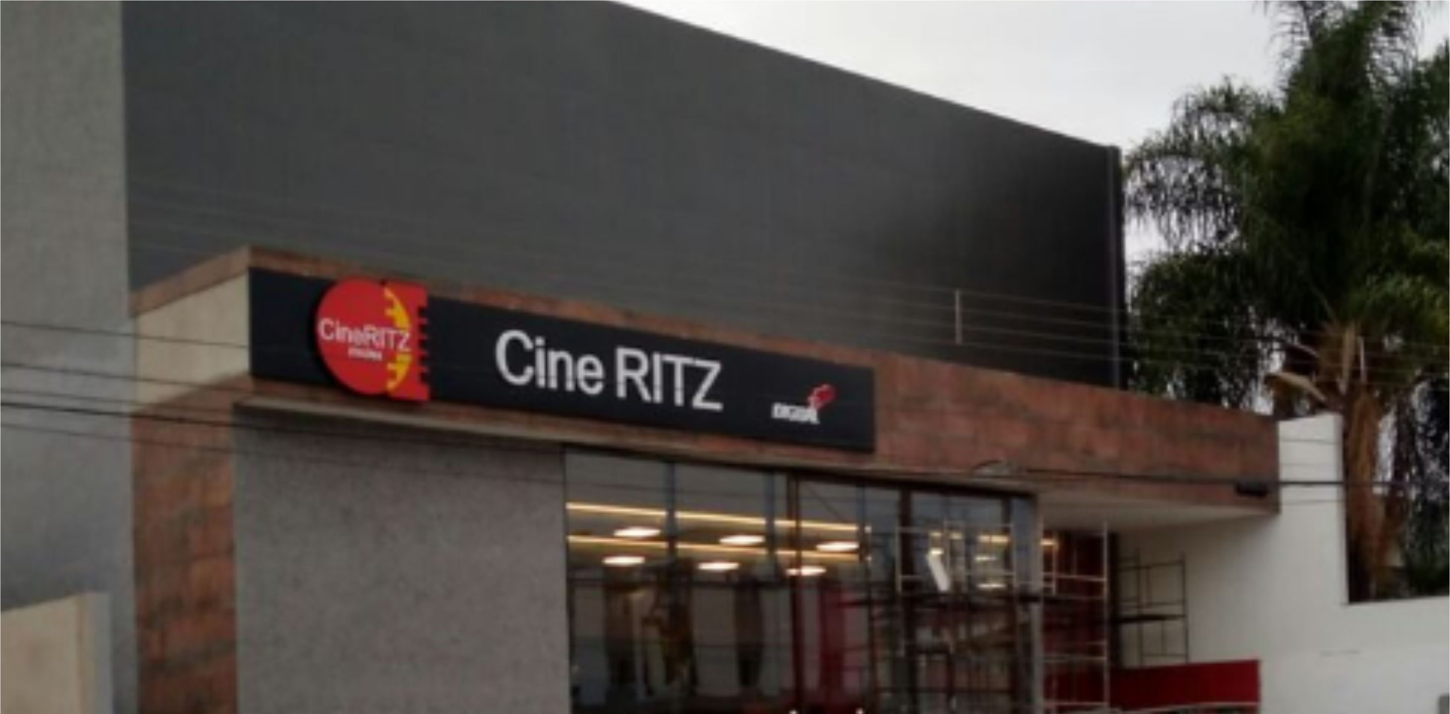 Vista frontal do Cine Ritz Itaúna